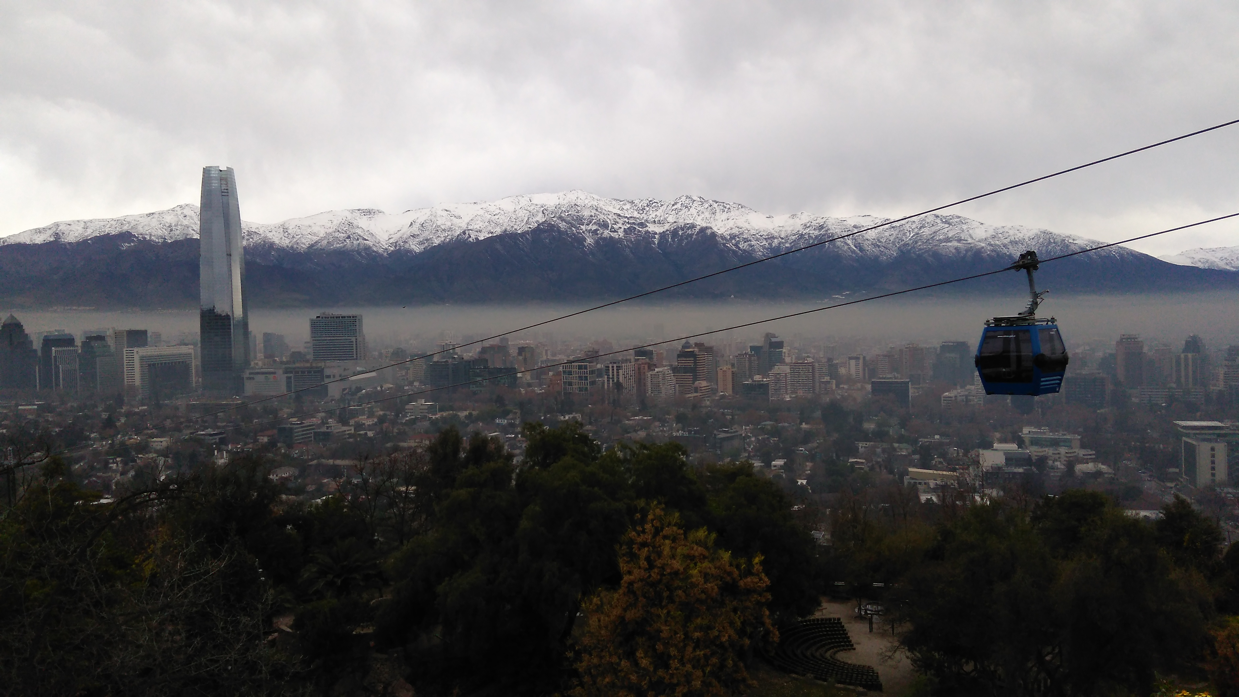 El teleférico de Santiago visto desde el cerro San Cristóbal con el edificio Costanera Center y la cordillera de Los Andes en el fondo.